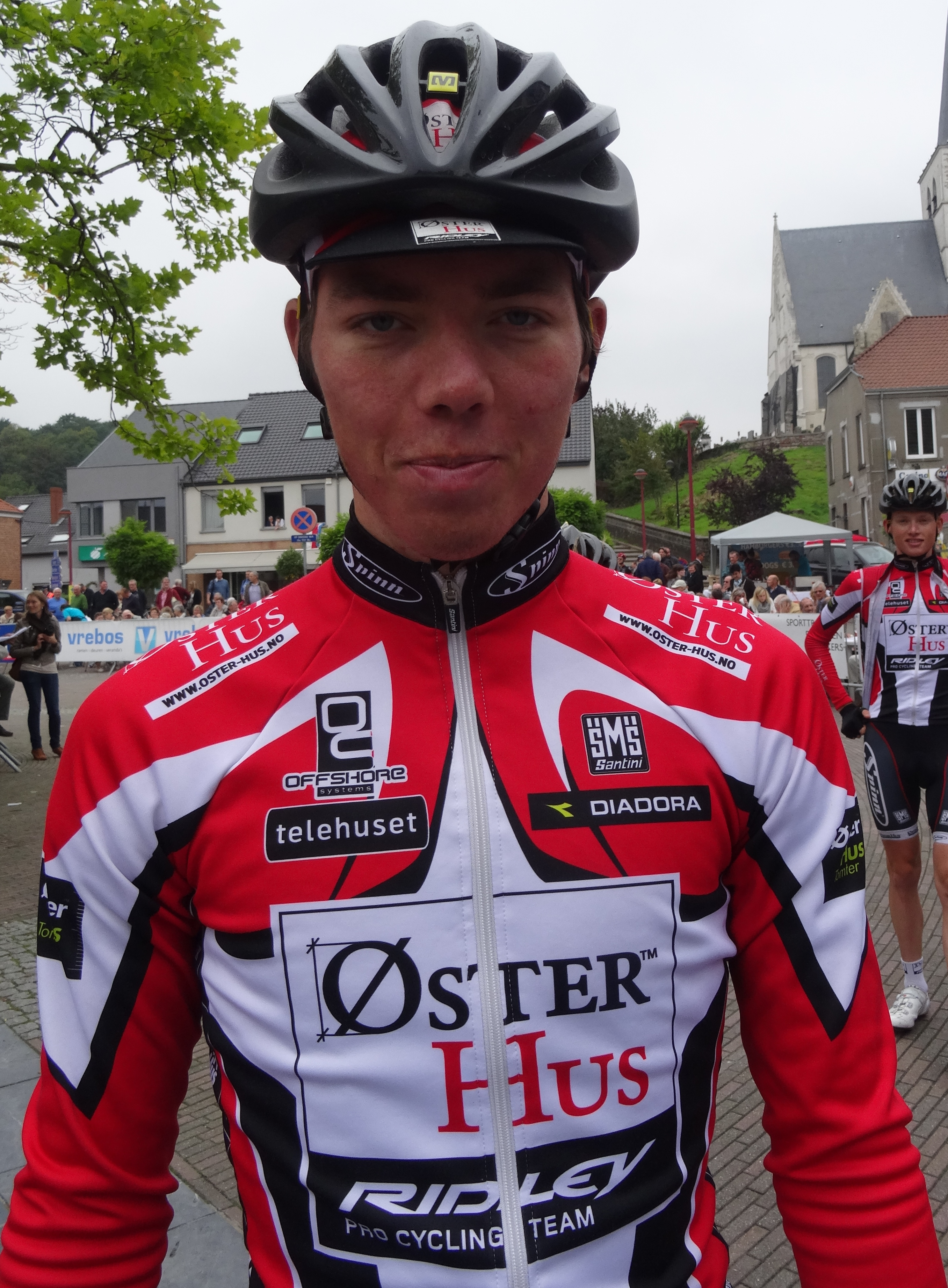 Reportage photographique réalisé le mercredi 27 août à l'occasion du départ de la Druivenkoers Overijse 2014 à Huldenberg, Belgique.